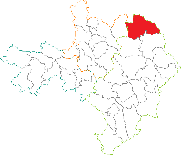 Situation du canton dans le département du Gard (France)